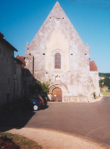 Date : 5 juin 2004 Source : photo personnelle d'Archie Description : La façade de l'église abbatiale de Fontaine-le-Comte ; on voit la grande baie en ogive qui a été murée suite à une première destruction, pour n'être remplacée que par une plus petite en plein cintre ; le portail est en contrebas du sol moderne. Licence